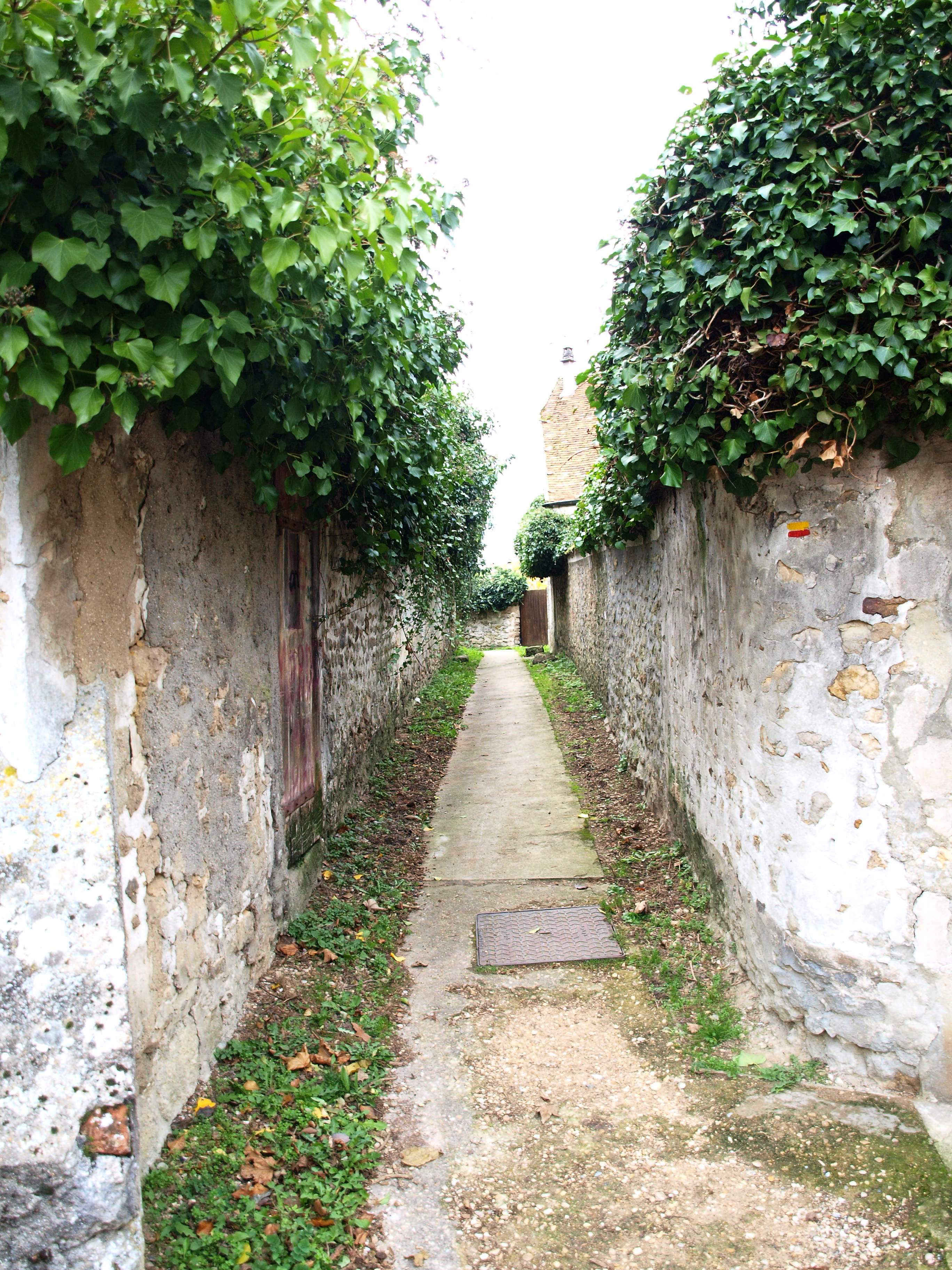 Servon (Seine-et-Marne) ; chemin de randonnée.